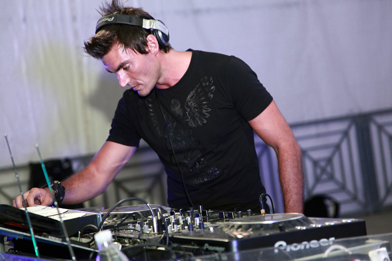 Gabry Ponte @ Troppifiky Bellaria